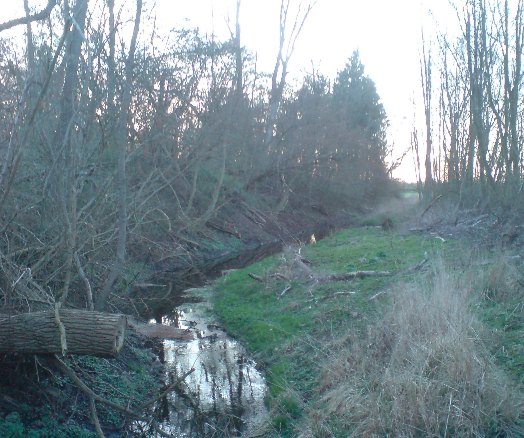 Beschreibung = Levensau bei Gut Warleberg, 100 Meter vor der Mündung in den Nord-Ostsee-Kanal